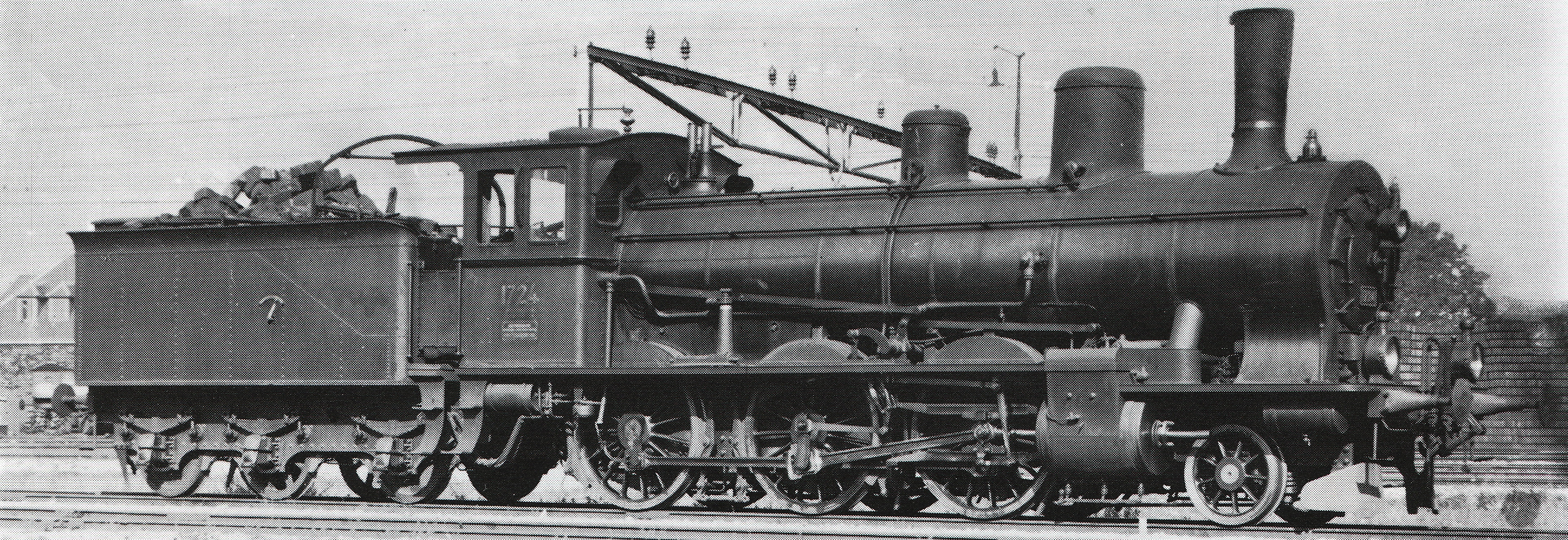 Dampflocomotive B 3/4 Nr. 1724 der Schweizeriſchen Bundesbahnen, gebaut 1905 inn der Schweizeriſchen Locomotiv- und Machines-Fabrique zů Winterthur (Fabricationsnr. 1632), 1932 außer Dienſt geſtellt und anſchließend abgebrochen.